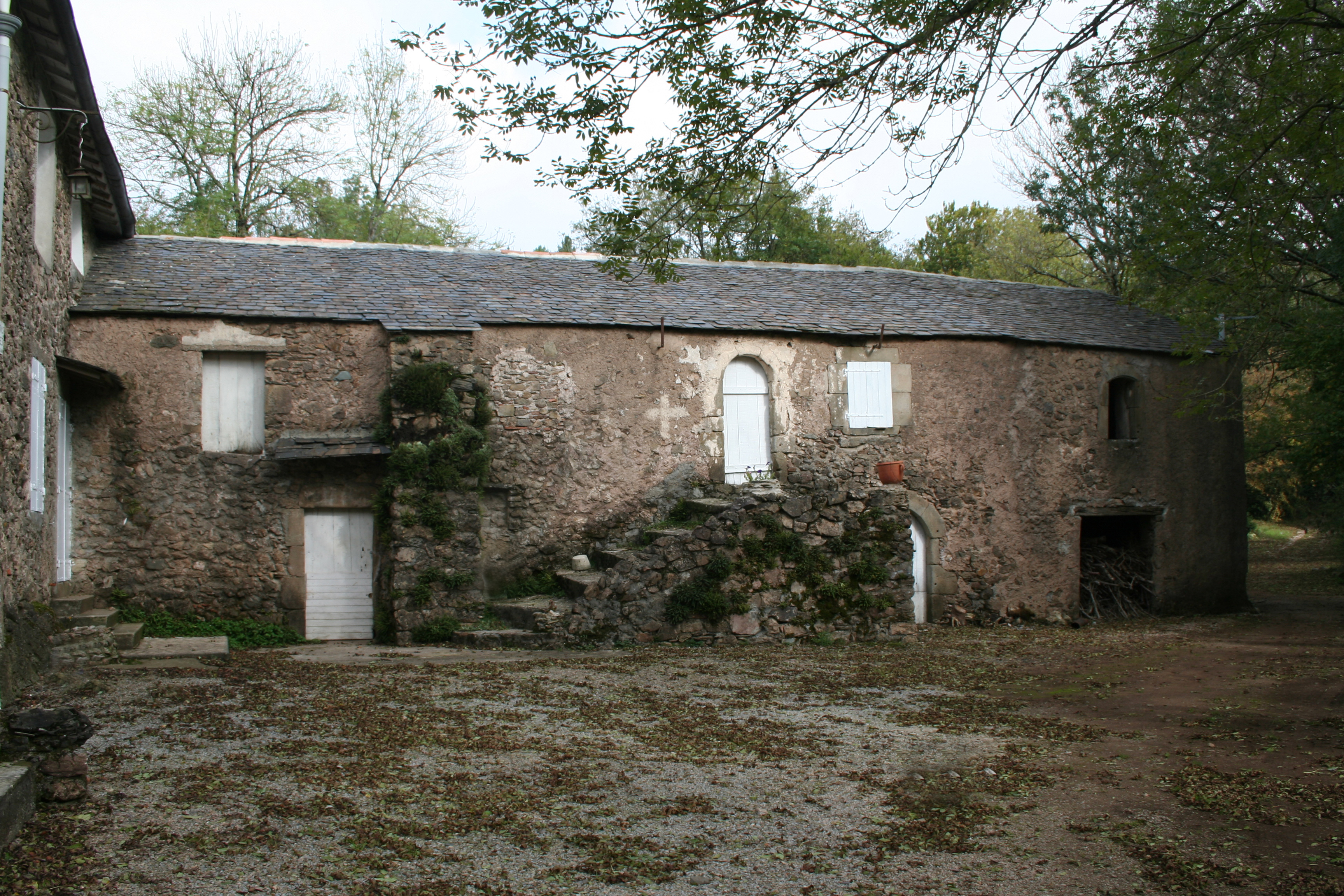 Castanet-le-Haut (Hérault) - ferme du Barthas (bâtiment du XVIIe siècle). Le toit et l'escalier ne sont pas dans leur état originel. Une fenêtre est obturée. Remarquer la croix blanche peinte à côté de l'entrée (tradition locale).